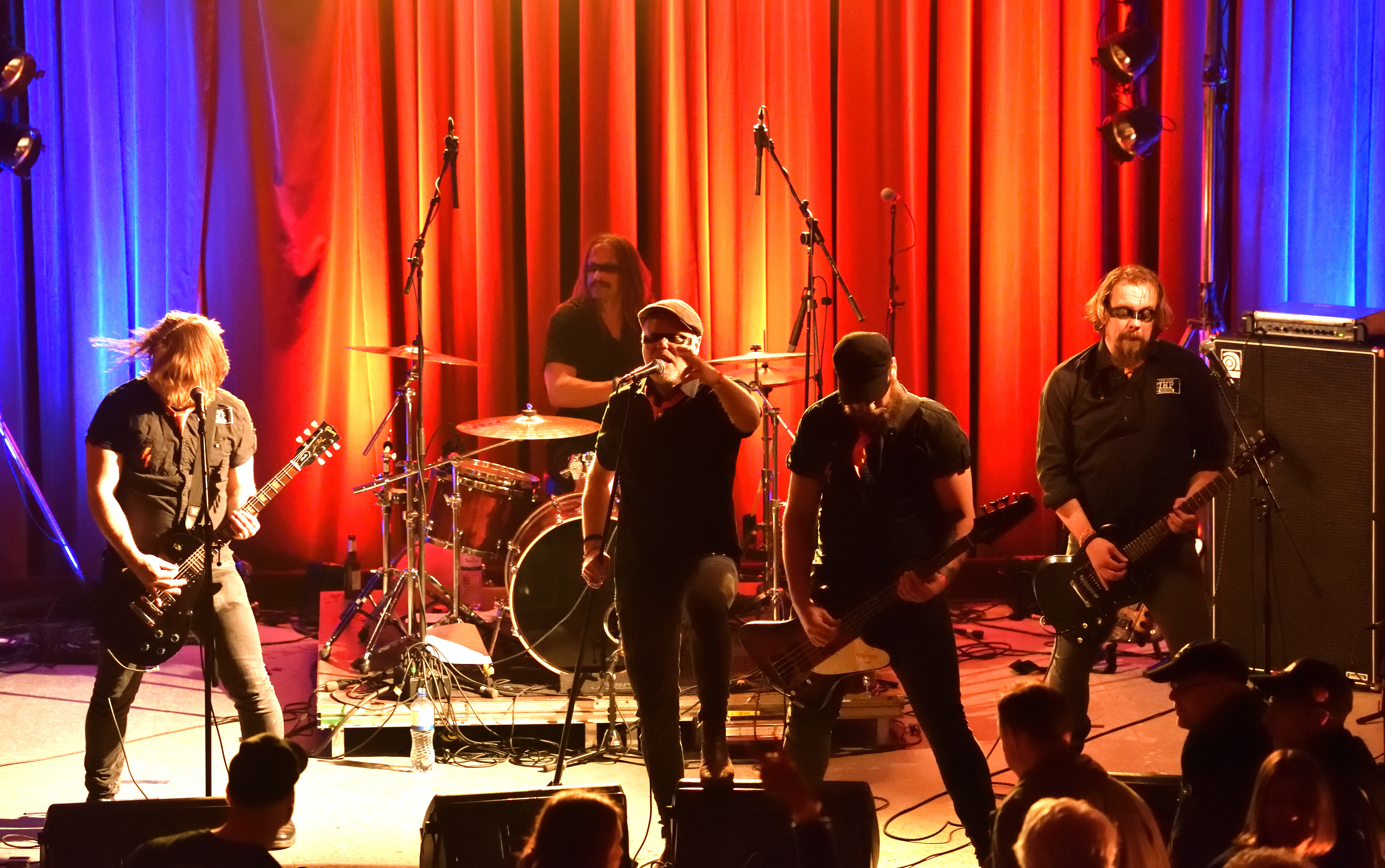 The Chuck Norris Experiment bei der Nacht der Gix 2016